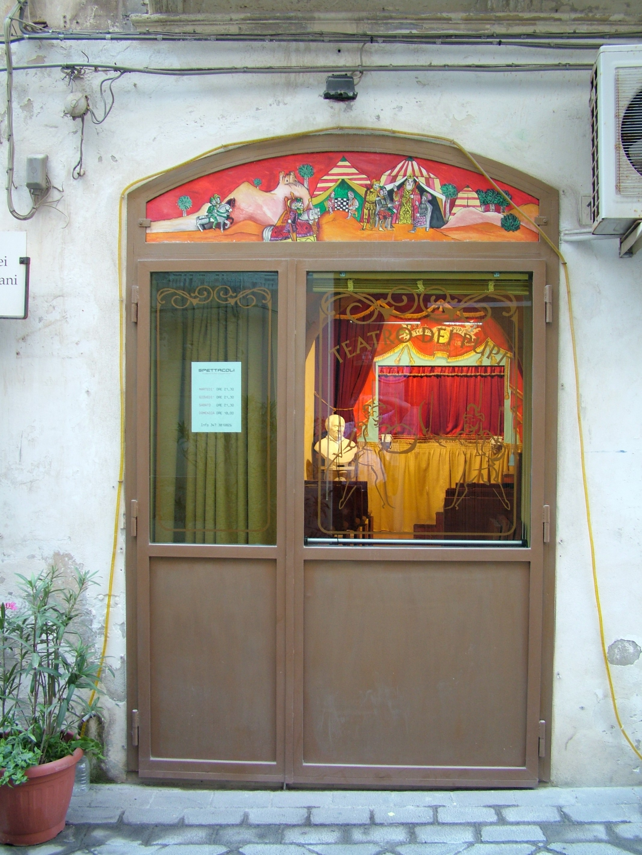 Teatro dei pupi di Siracusa, Sicily, Italia